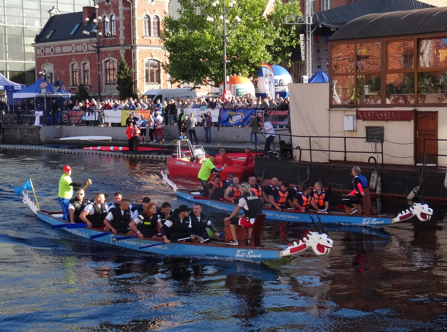 XXV Wielka Wioślarska o Puchar Brdy 2016, wyścig smoczych łodzi (policja, centrum szkolenia NATO)